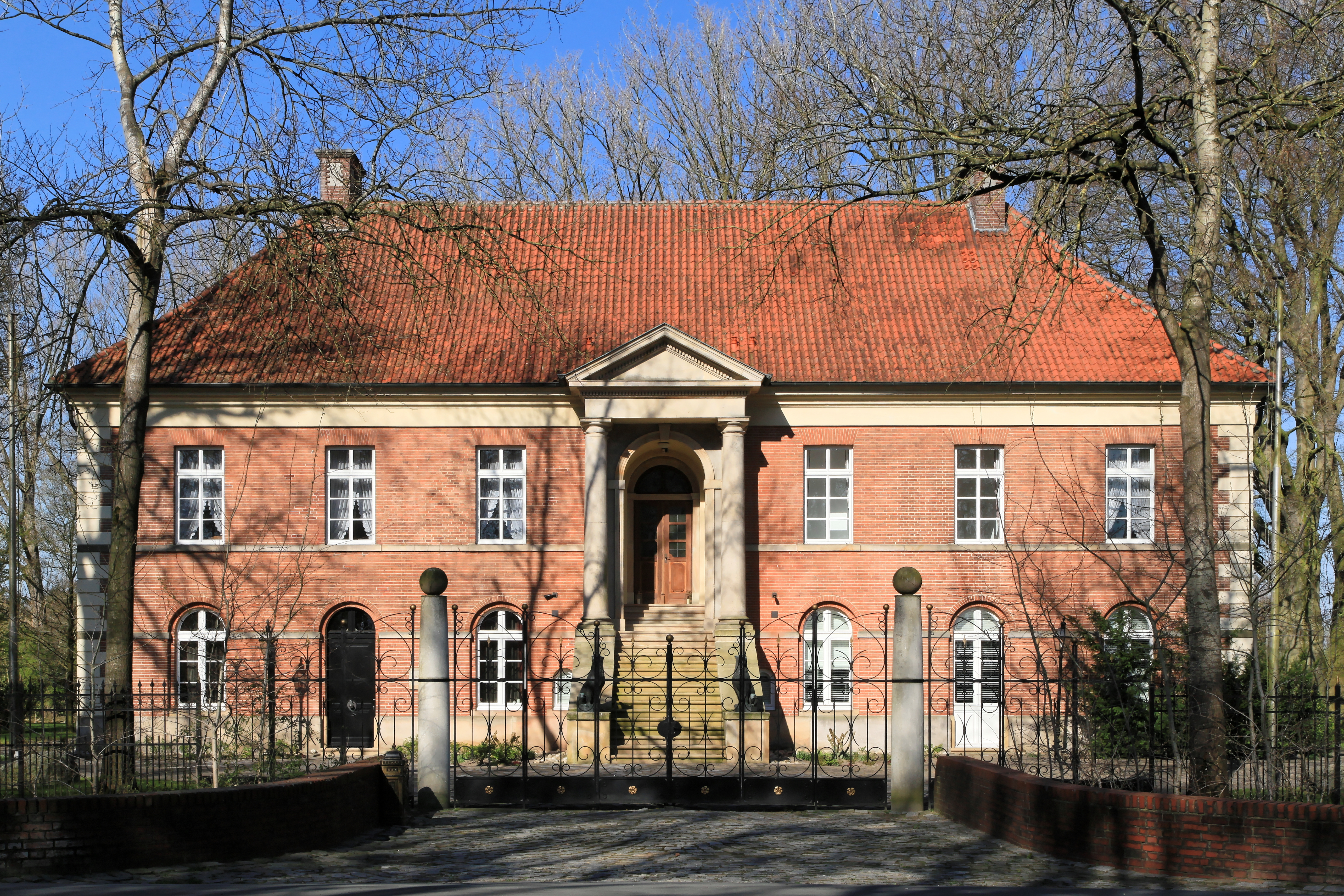 Amtshaus Nienhaus, Meppener Straße (B70) in Aschendorf, Papenburg